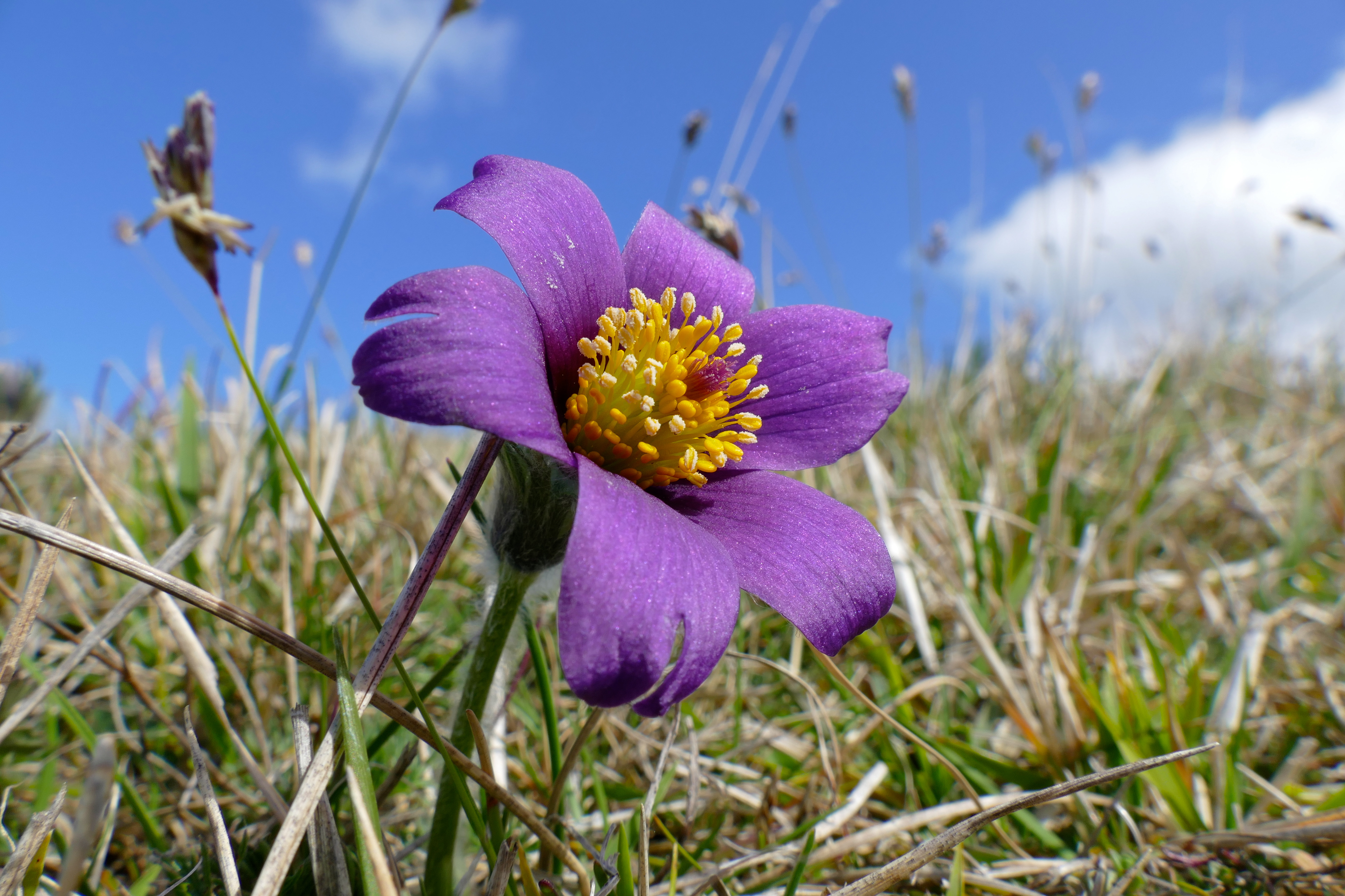 Une anémone pulsatille (Anemone pulsatilla) sur le coteau de Mesnil-Soleil (Basse-Normandie).